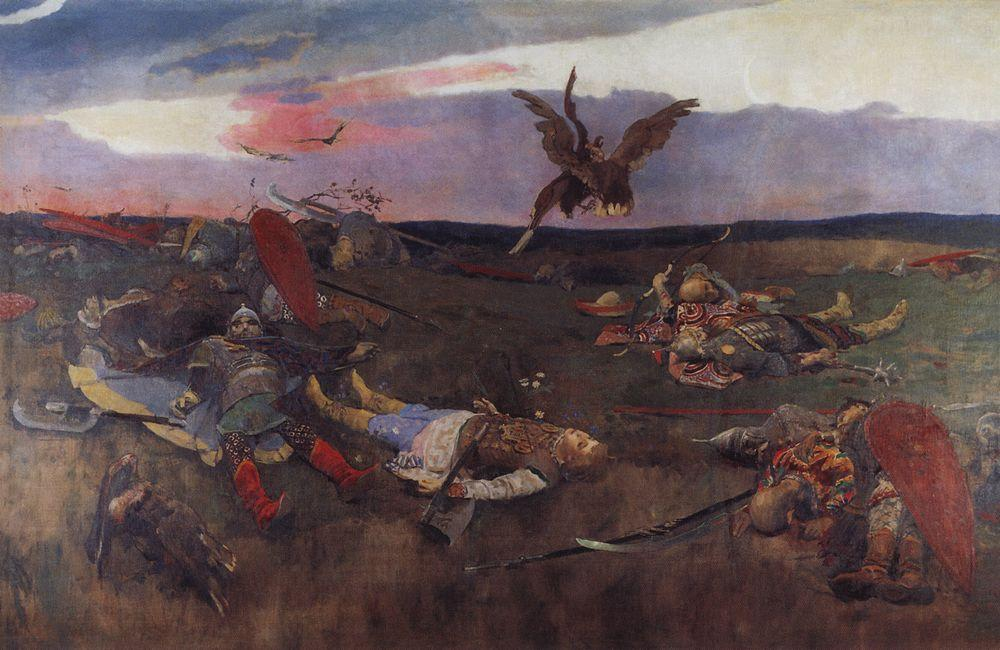 После побоища Игоря Святославовича с половцами